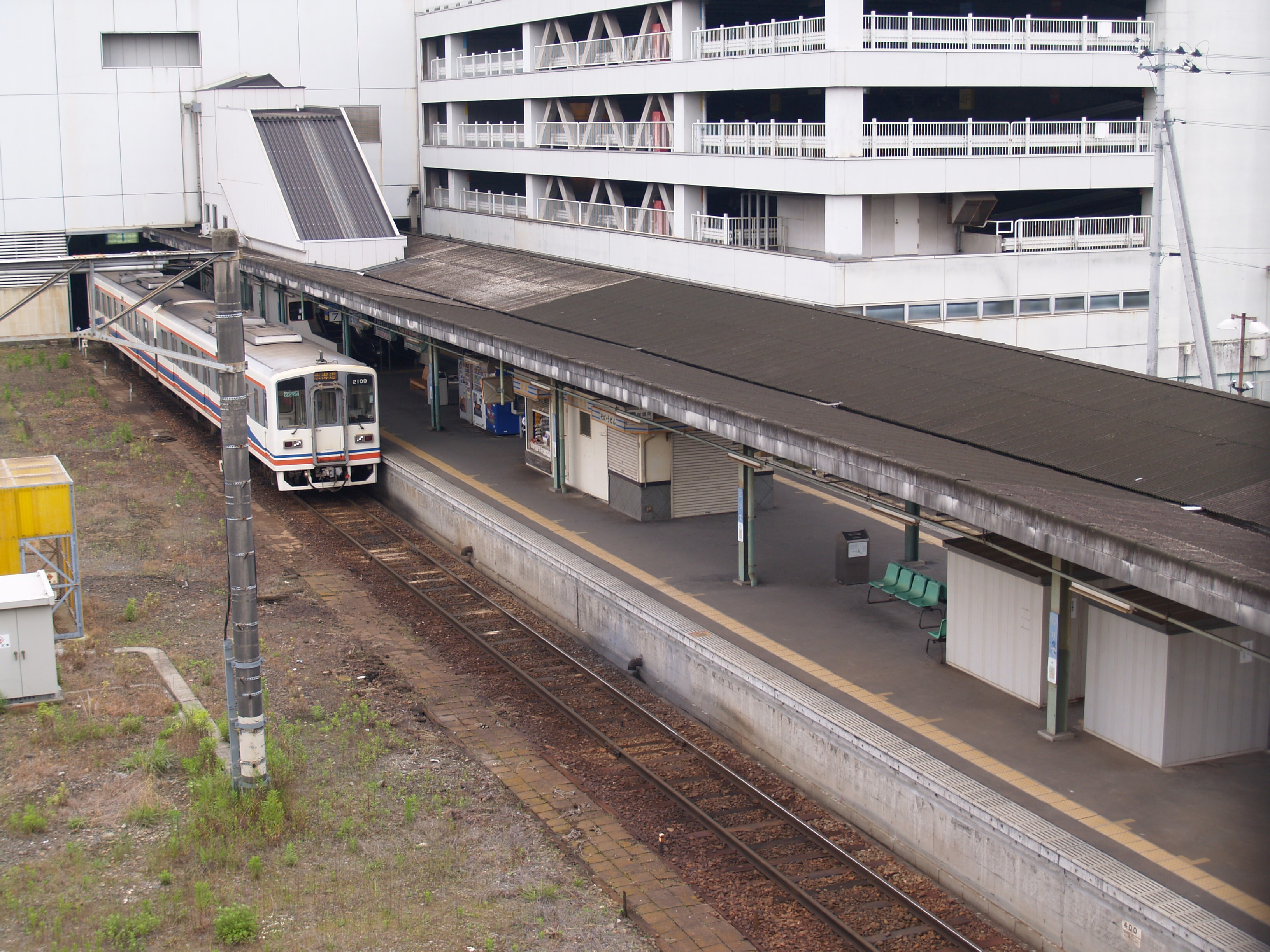 取手駅関東鉄道ホーム（跨線橋から撮影）